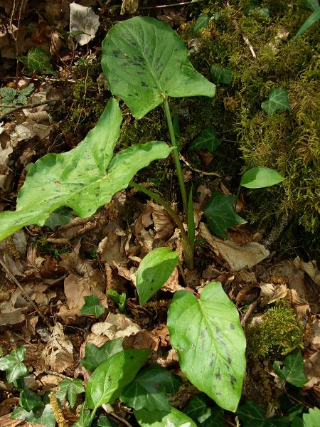 Arum maculatum, Gouet tacheté, Gy.